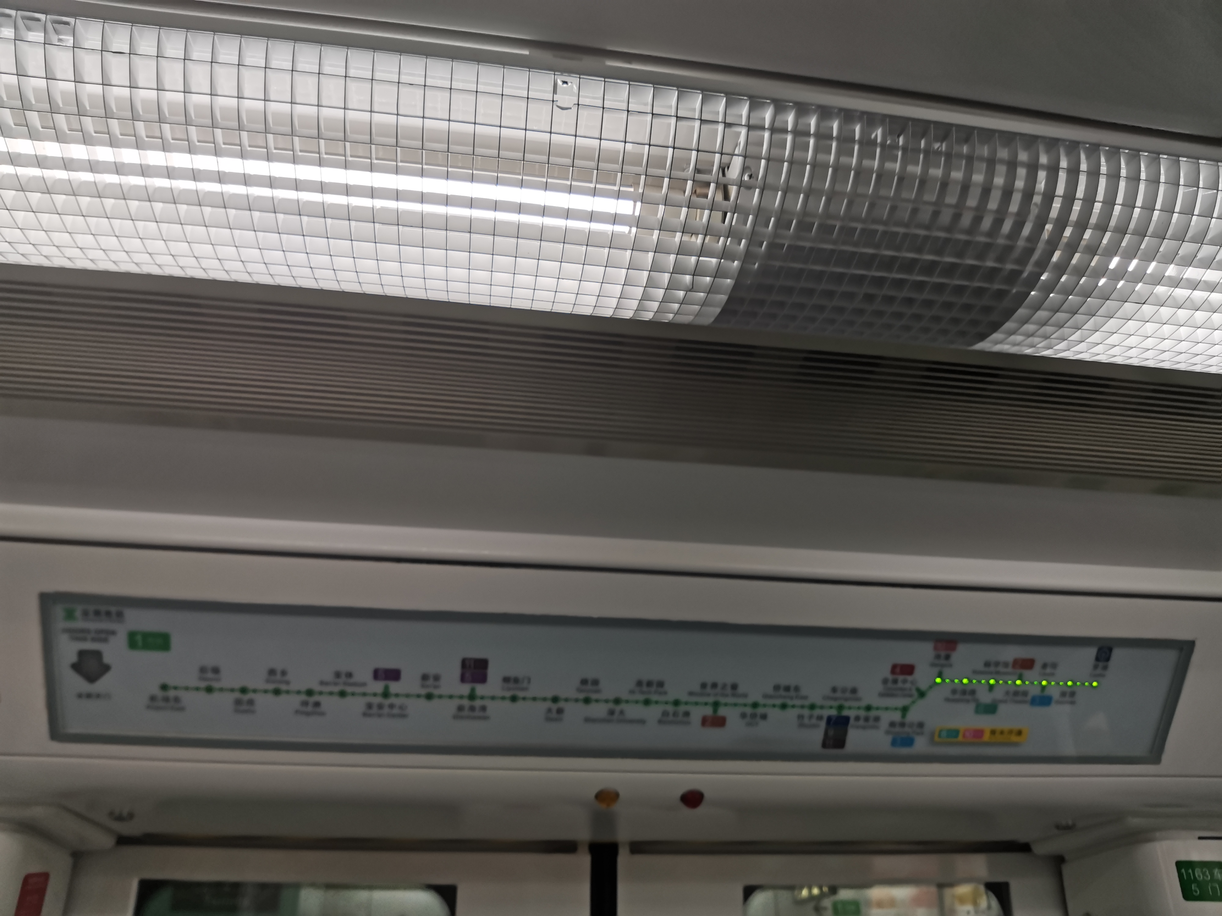 深圳地铁1号线movia型动车组闪灯图（2020年版）